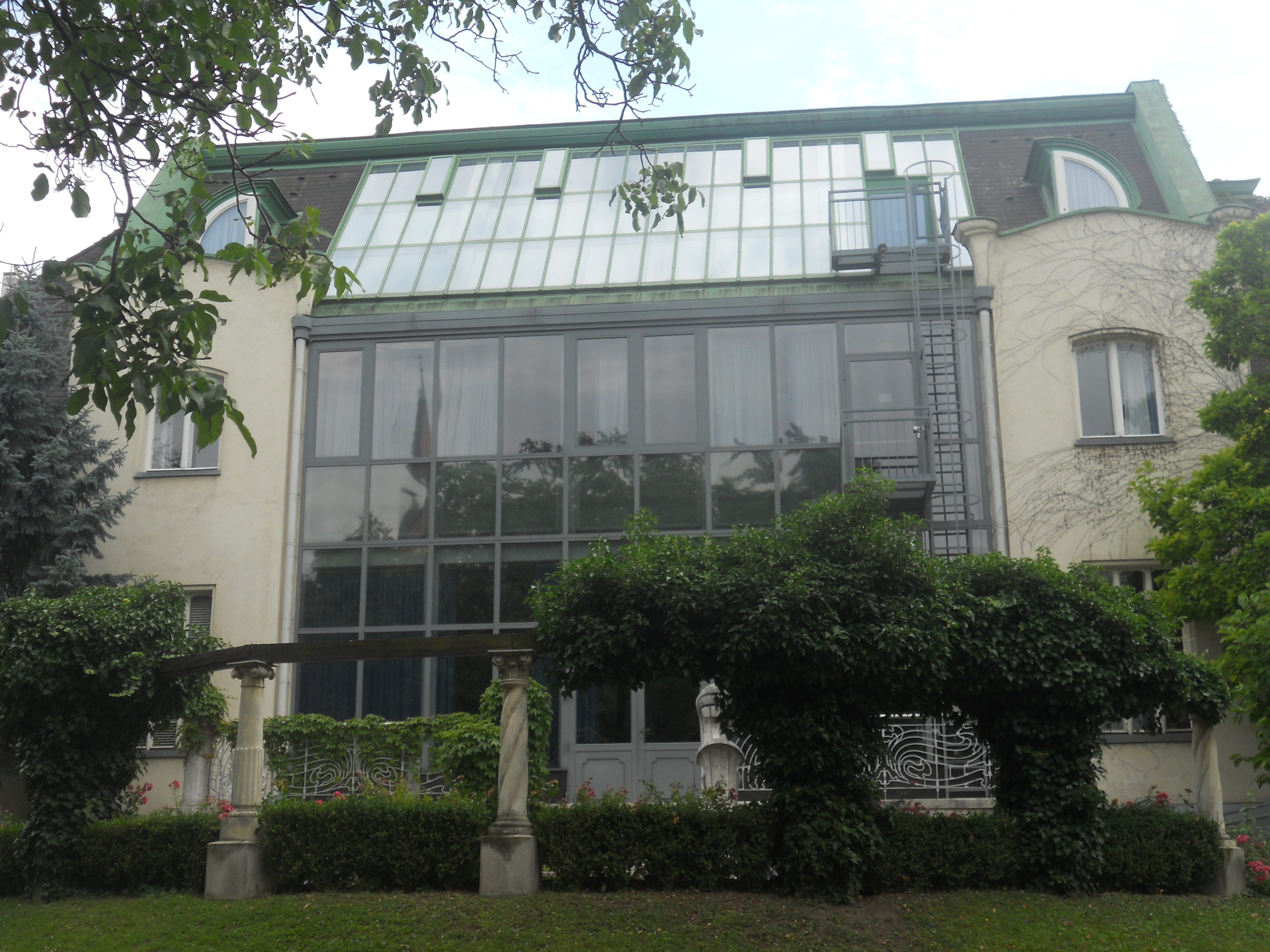 Das ehemalige Atelier des Bildhauers Josef Engelhart, im hof Steingasse 15/Hafengasse 1a in Wien